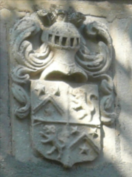 Blason : de Méjanès Larguiez; château de Larguiez Salles-Curan (Aveyron).